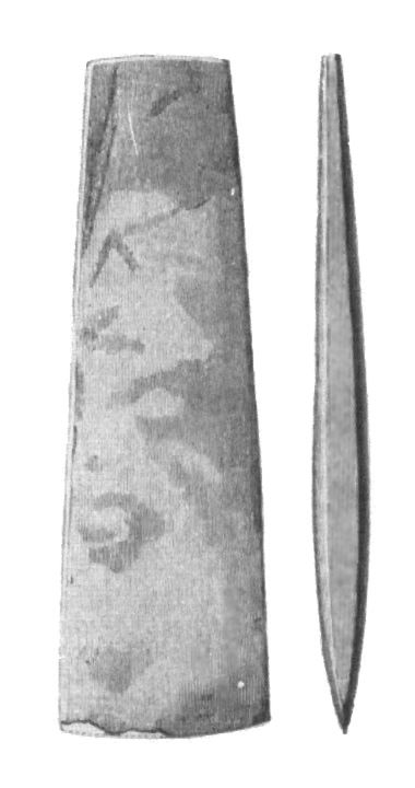 Tunn-nackig flintyxa. Skåne